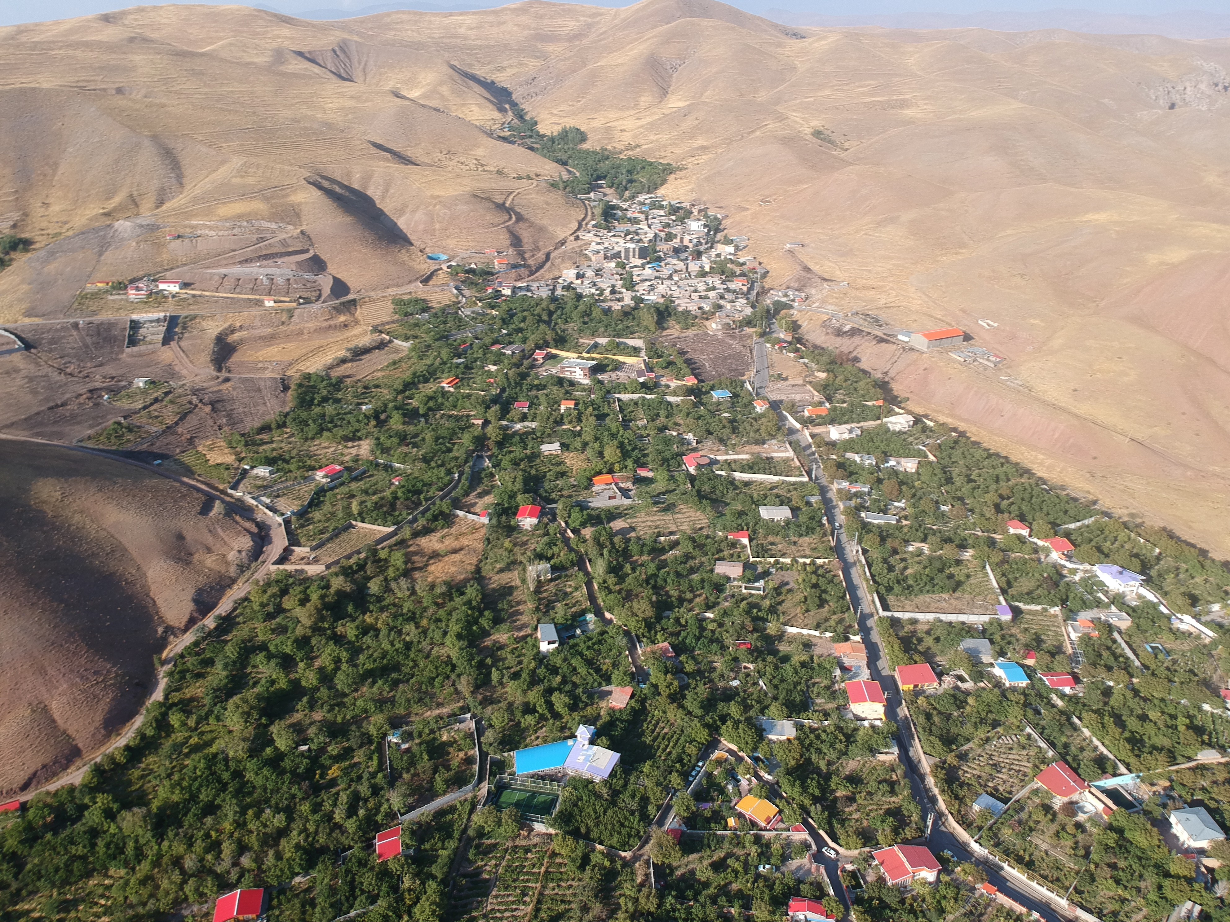 تصویری هوایی از روستای خوش آب و هوا و ویلاشهر اندبیل